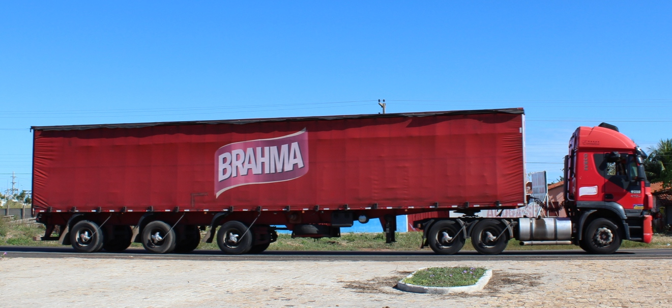 Caminhão da cervejaria Brahma na BR-343, em Campo Maior, Piauí.